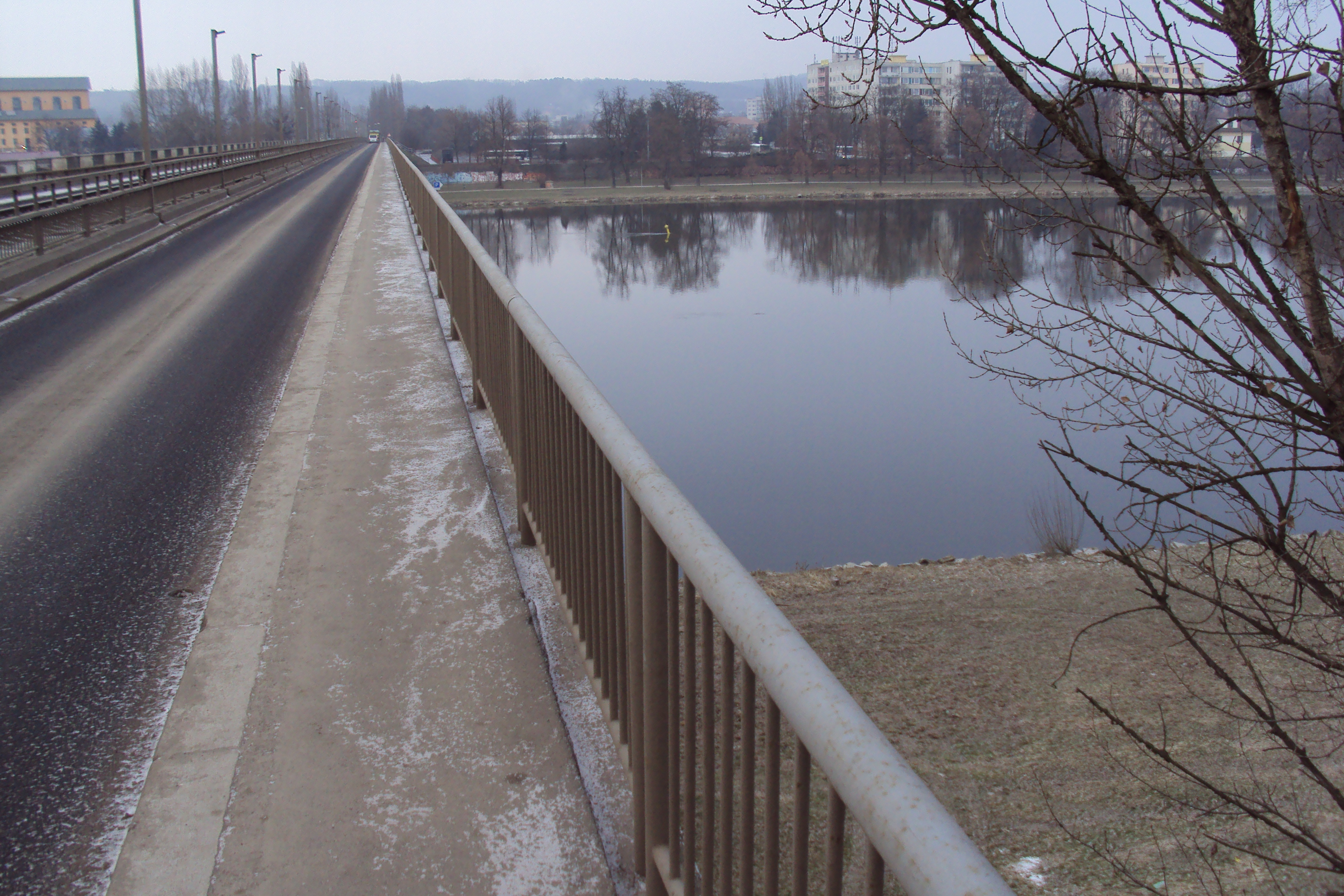 Most přes Labe ze Štětí do Hněvic, pro auta, pěší i železnici